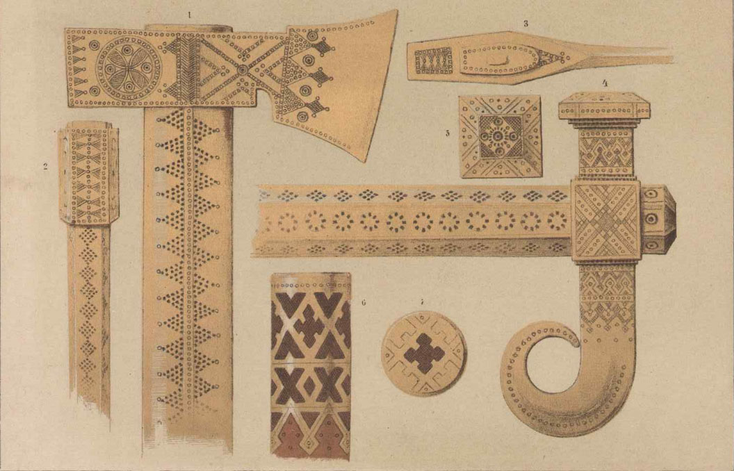 Страница издания «Обзор домашнего промысла. Металлические изделия крестьян на Руси», Промышленный музей во Львове Табл. ІХ 1 — 3 — топорик-бартка 4, 5 — келев или обух 6, 7 — посох